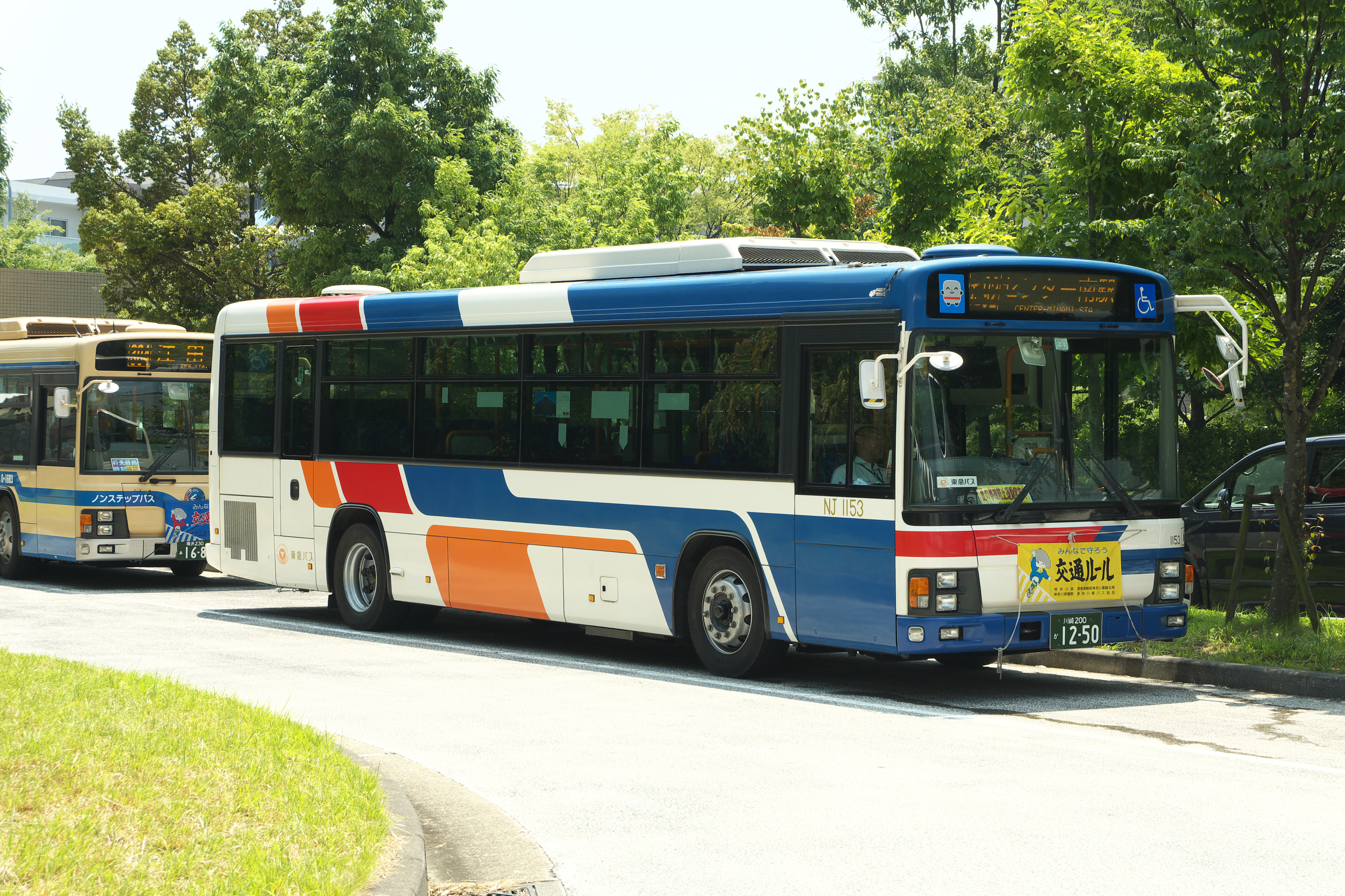 東急バス創立20周年記念 観光バス用マーキュリーカラー塗装車 （センター南駅にて撮影）